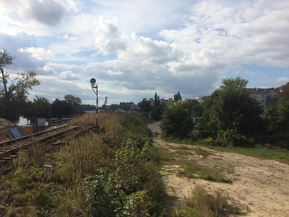 Gorzów Wielkopolski Wschodni